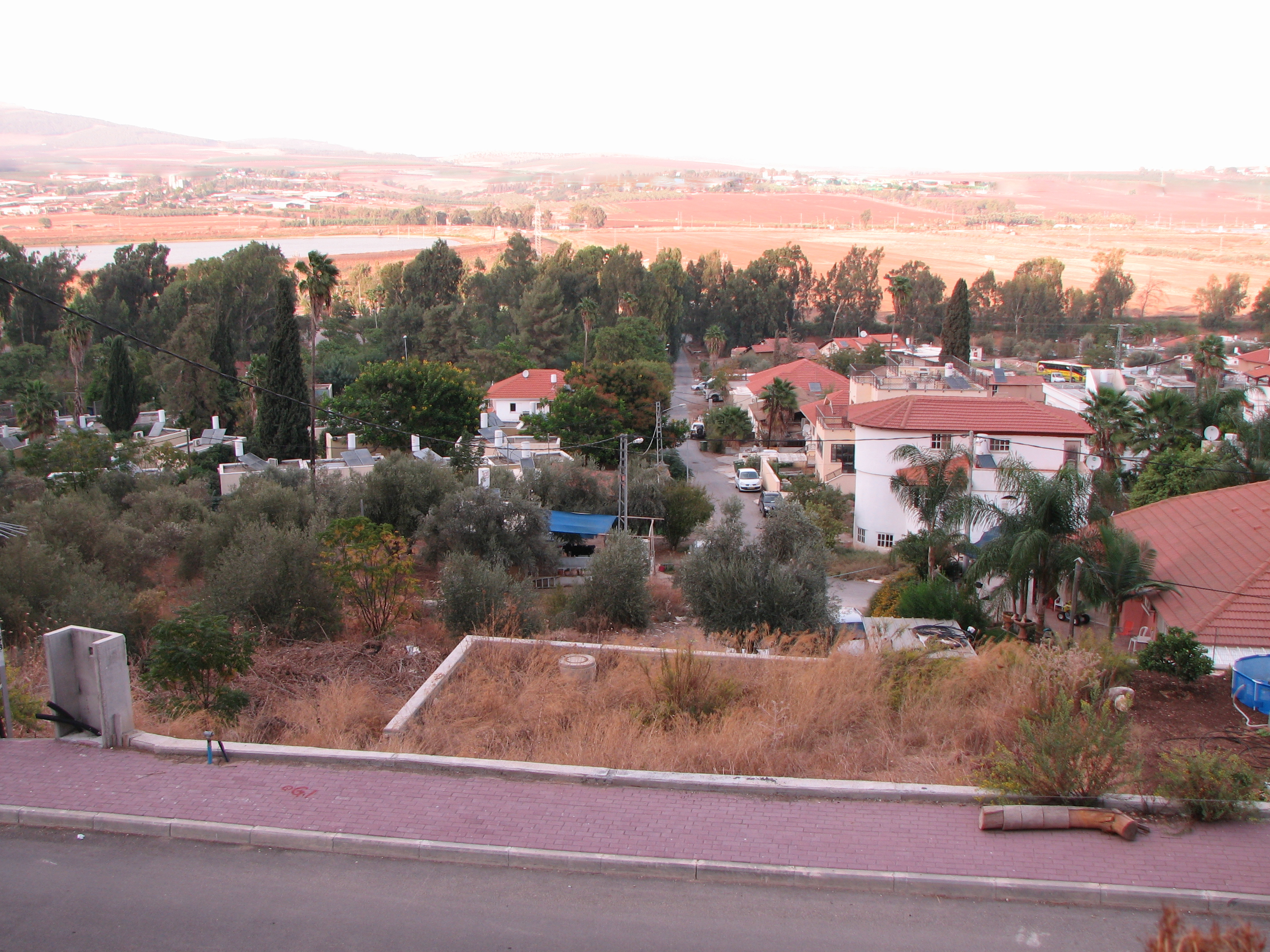 גידעונה